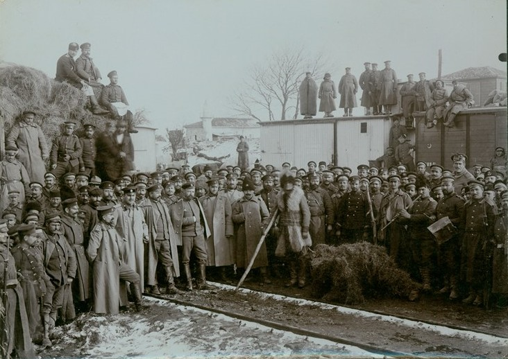 Празнуващи български офицери и войници от Седемнадесети пехотен доростолски полк на Чаталджанските позиции.